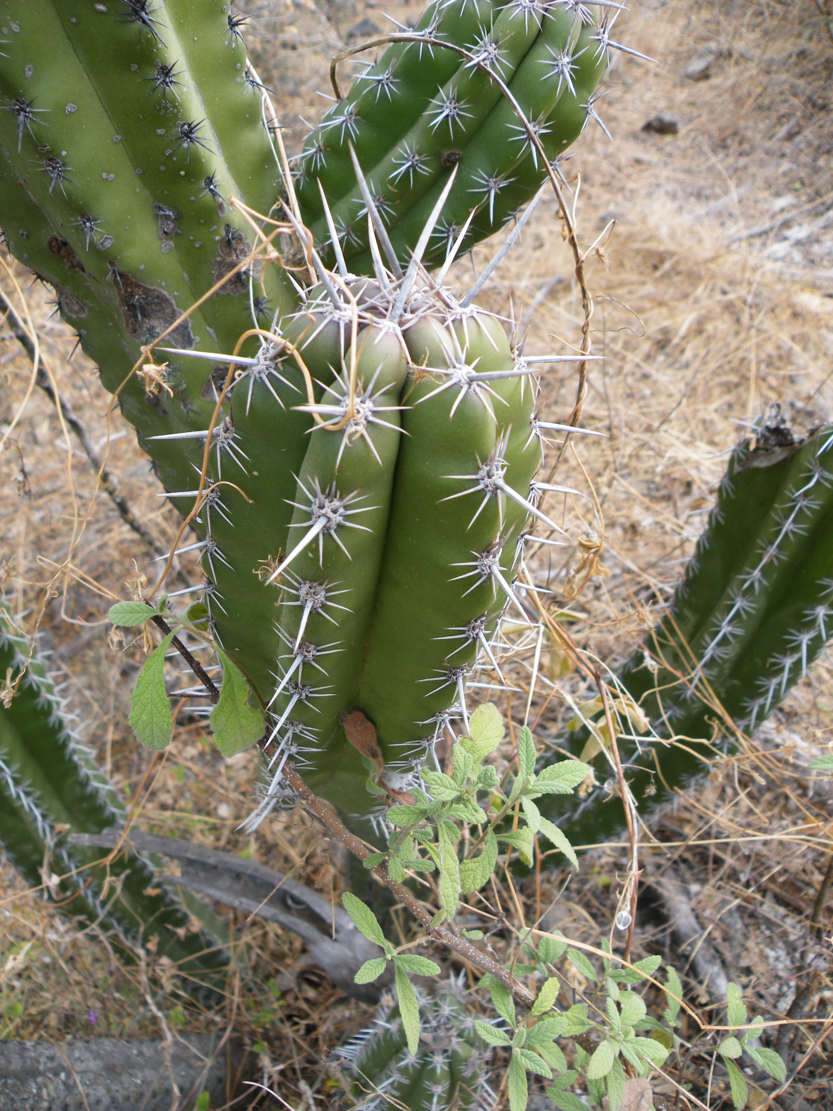 Tomellin, Oaxaca